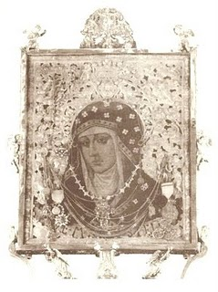 Nuestra Señora de Loreto, patrona de Mutxamel (Alicante) Spain